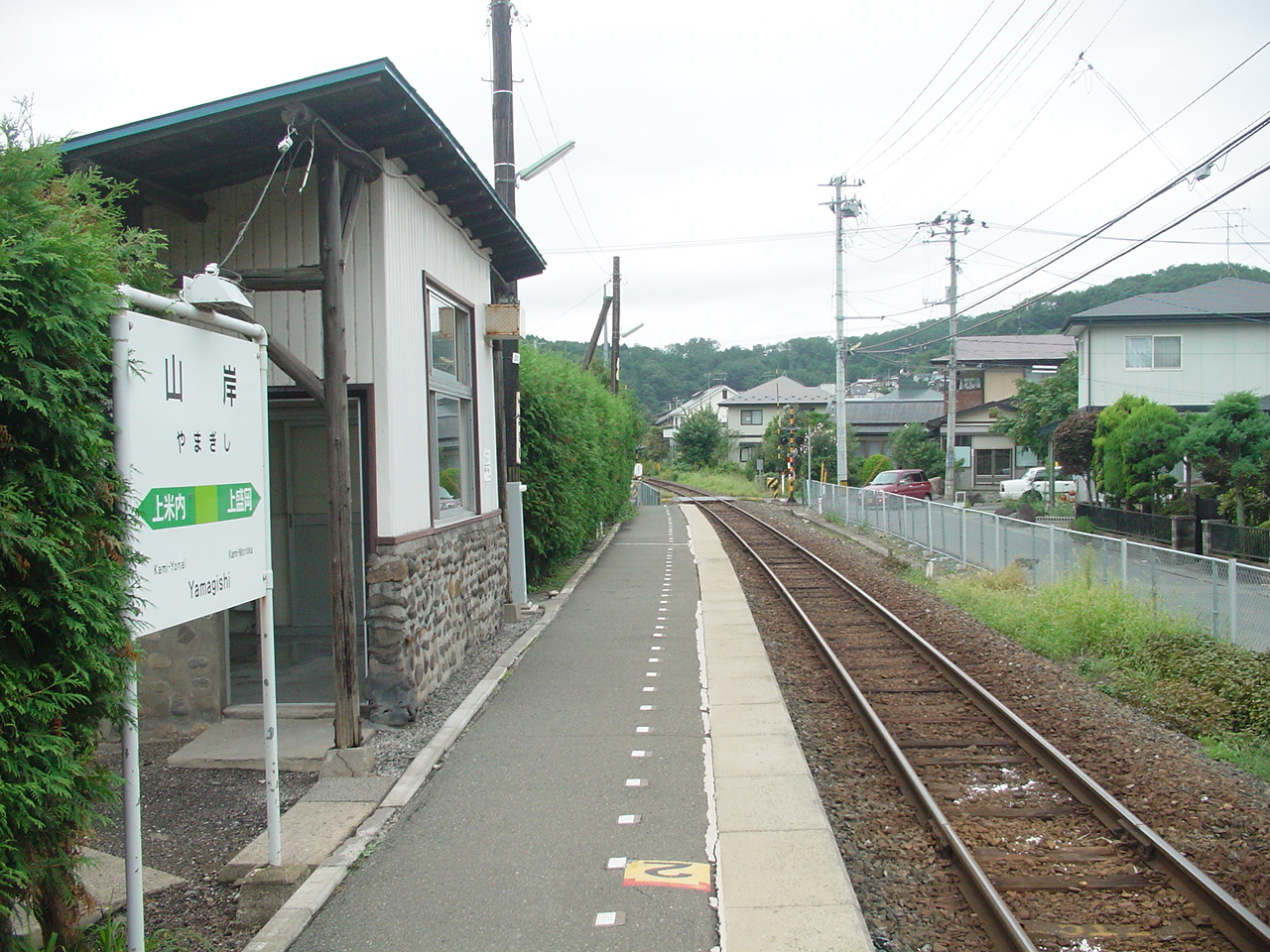 （山岸駅）